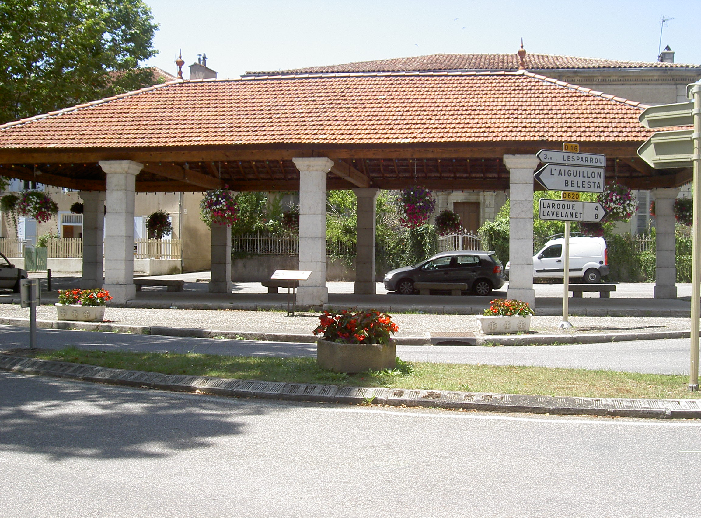 La Bastide sur l'Hers (Ariège)